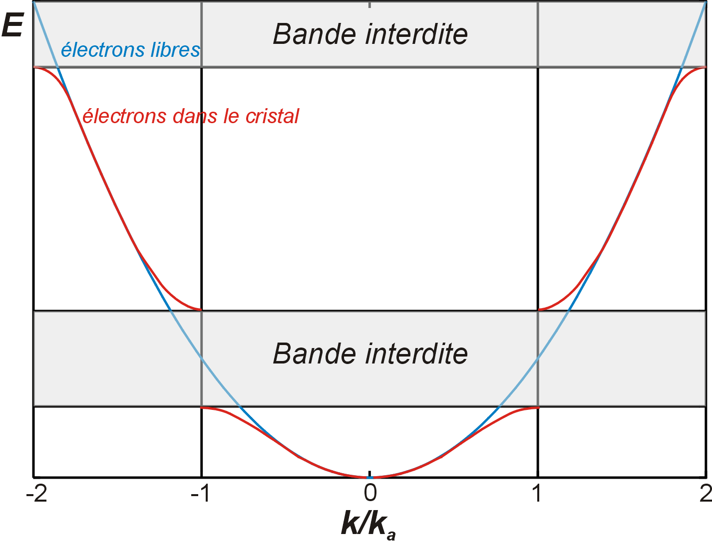 Description: Formation de bandes interdites dans le diagramme énergie/vecteur d'onde pour des électrons placés dans un cristal. E: énergie des électrons k: vecteur d'onde des électrons (ici en 1D) ka: vecteur d'onde fondamental du réseau cristallin Source: Guillaume Montémont Licensing Catégorie:Schéma de physique